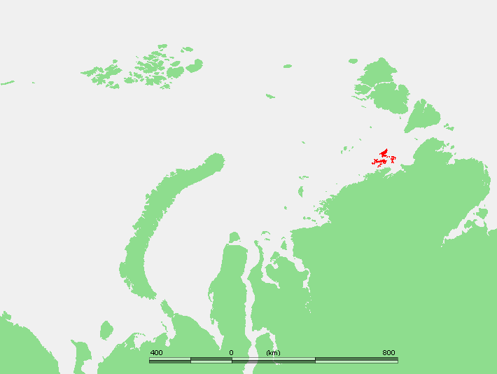 Nordensjelda Islands